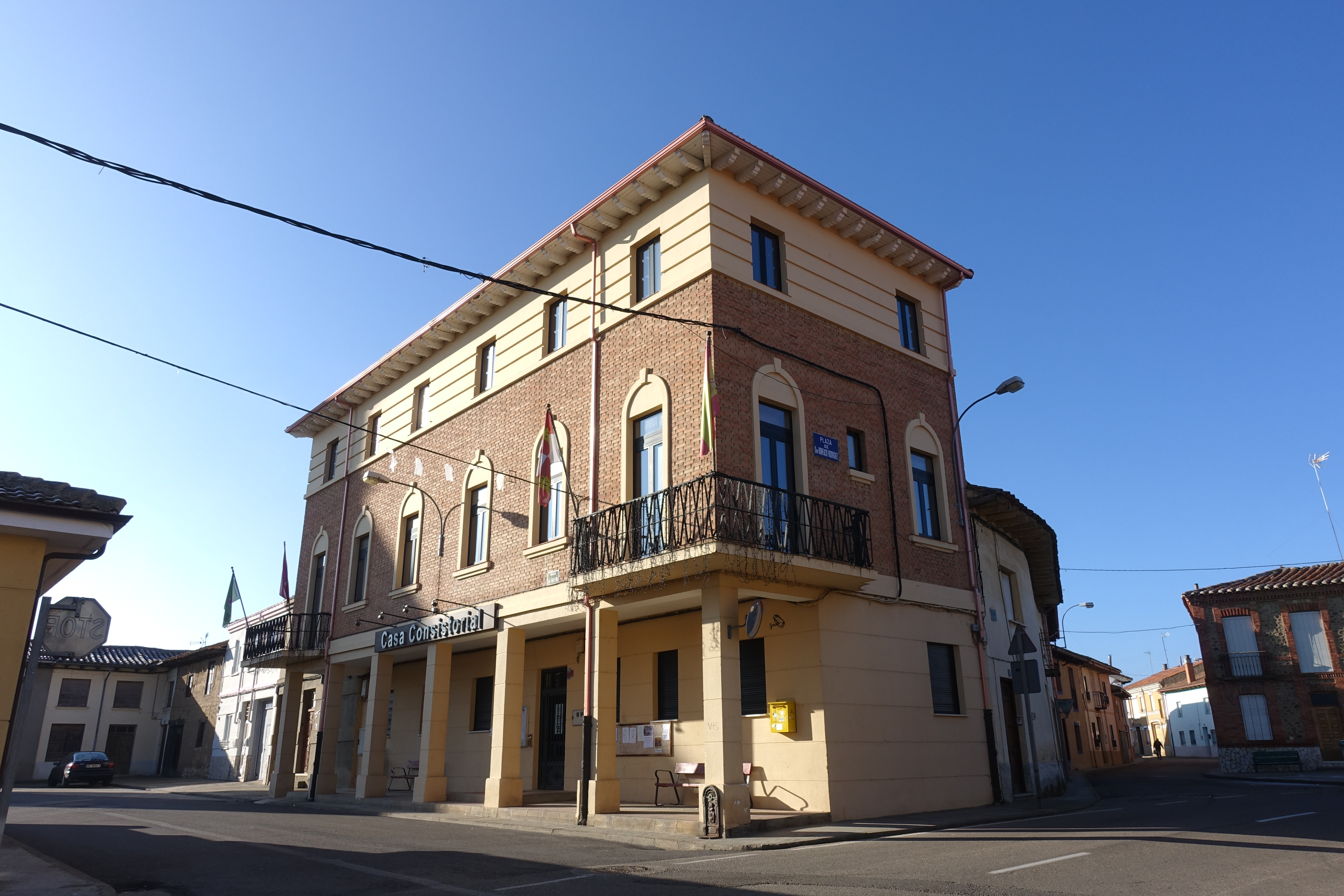 Casa consistorial de Villarejo de Órbigo (León, España).